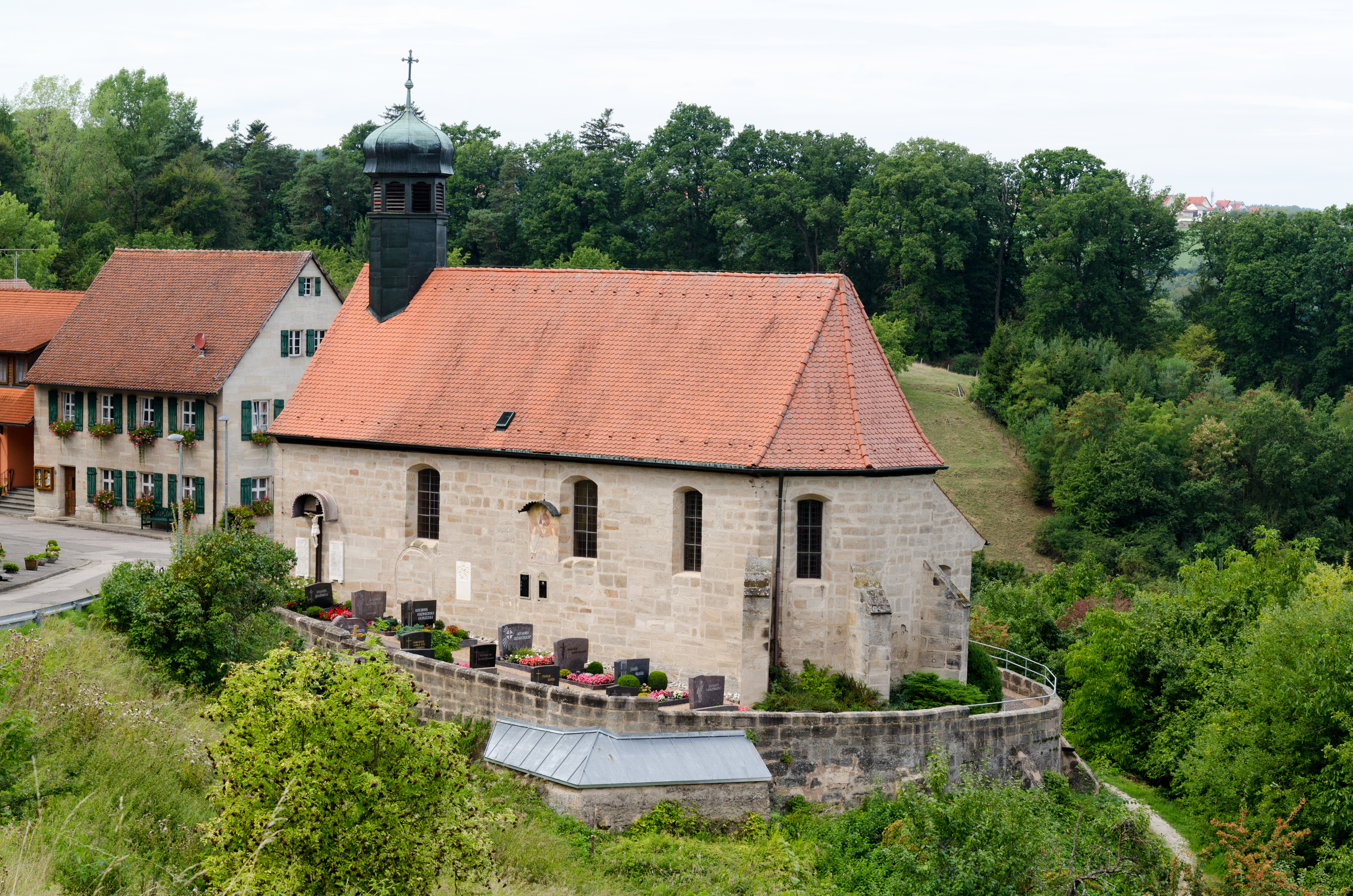 Spalt, Hagsbronn, Kath. Filialkirche St. Ägidius